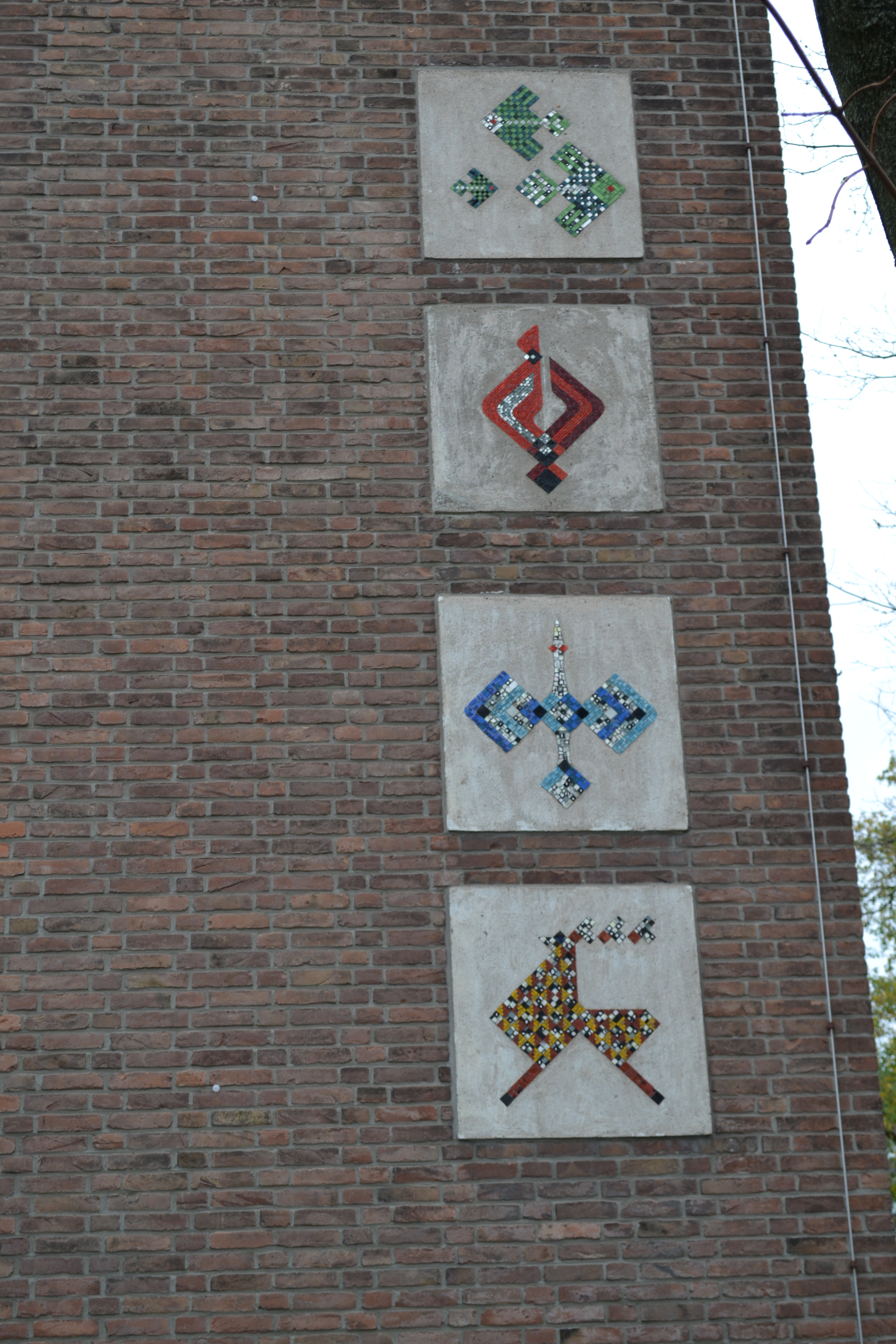 Mosaik von Erwin Kretz, Darstellung der 4 Elemente, Tafeln ca. 80x100cm, Schulgebäude des Humboldt-Gymnasiums, Düsseldorf (ca. 1955)